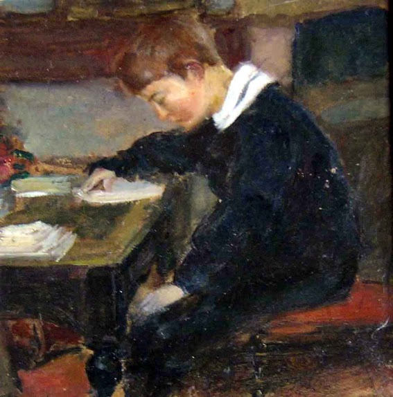 Le frère de Fernand